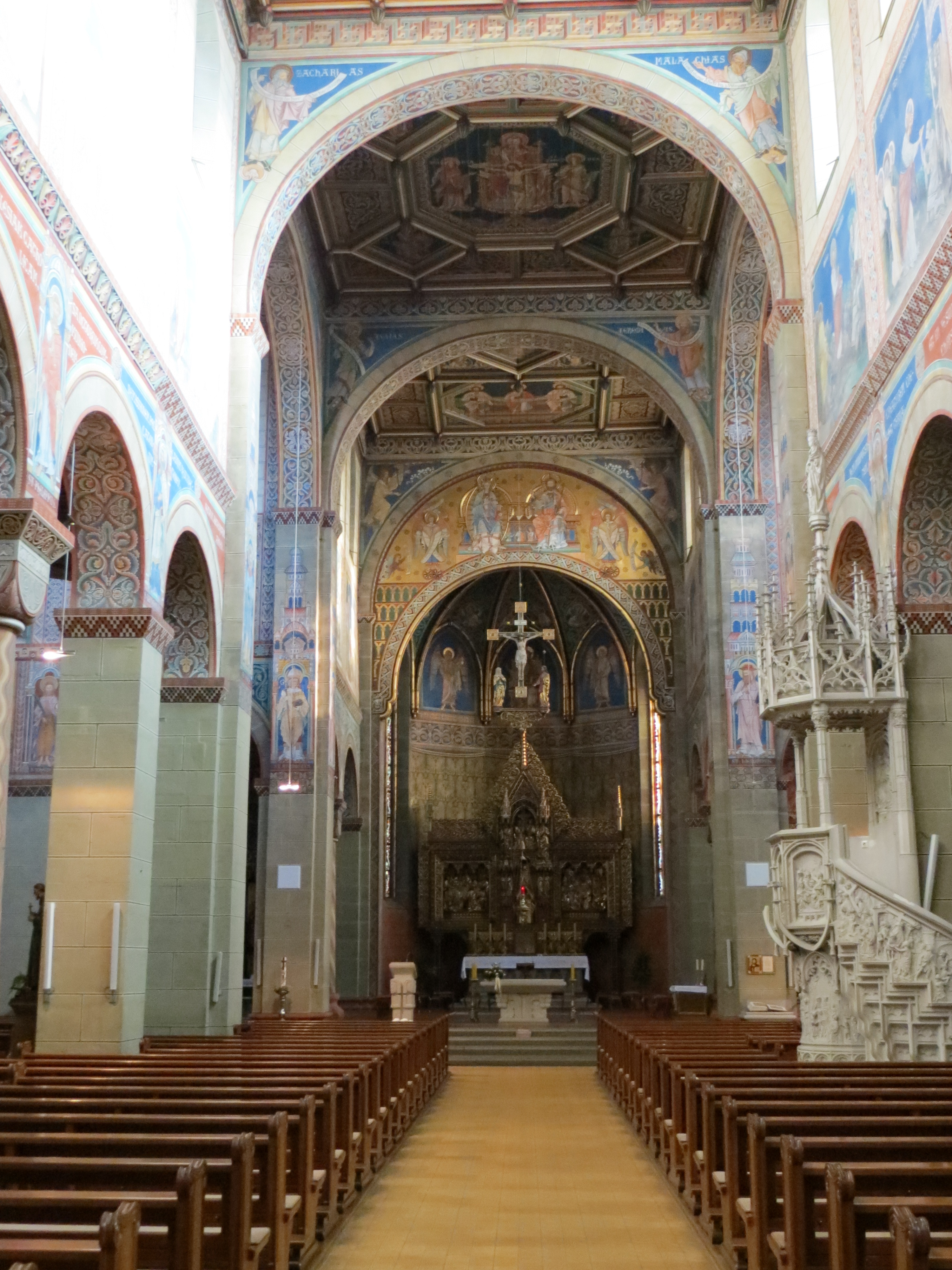 Gengenbach Pfarrkirche St. Marien Innenraum